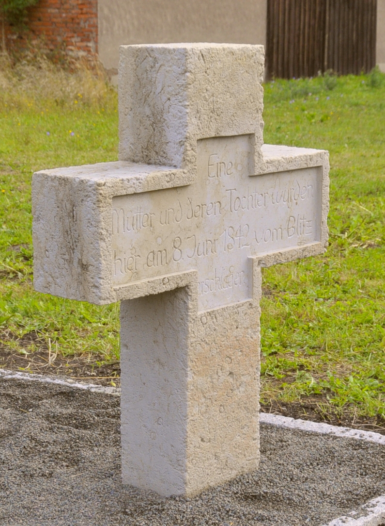 Mühlberger (Drei Gleichen) Steinkreuz, Vorderseite